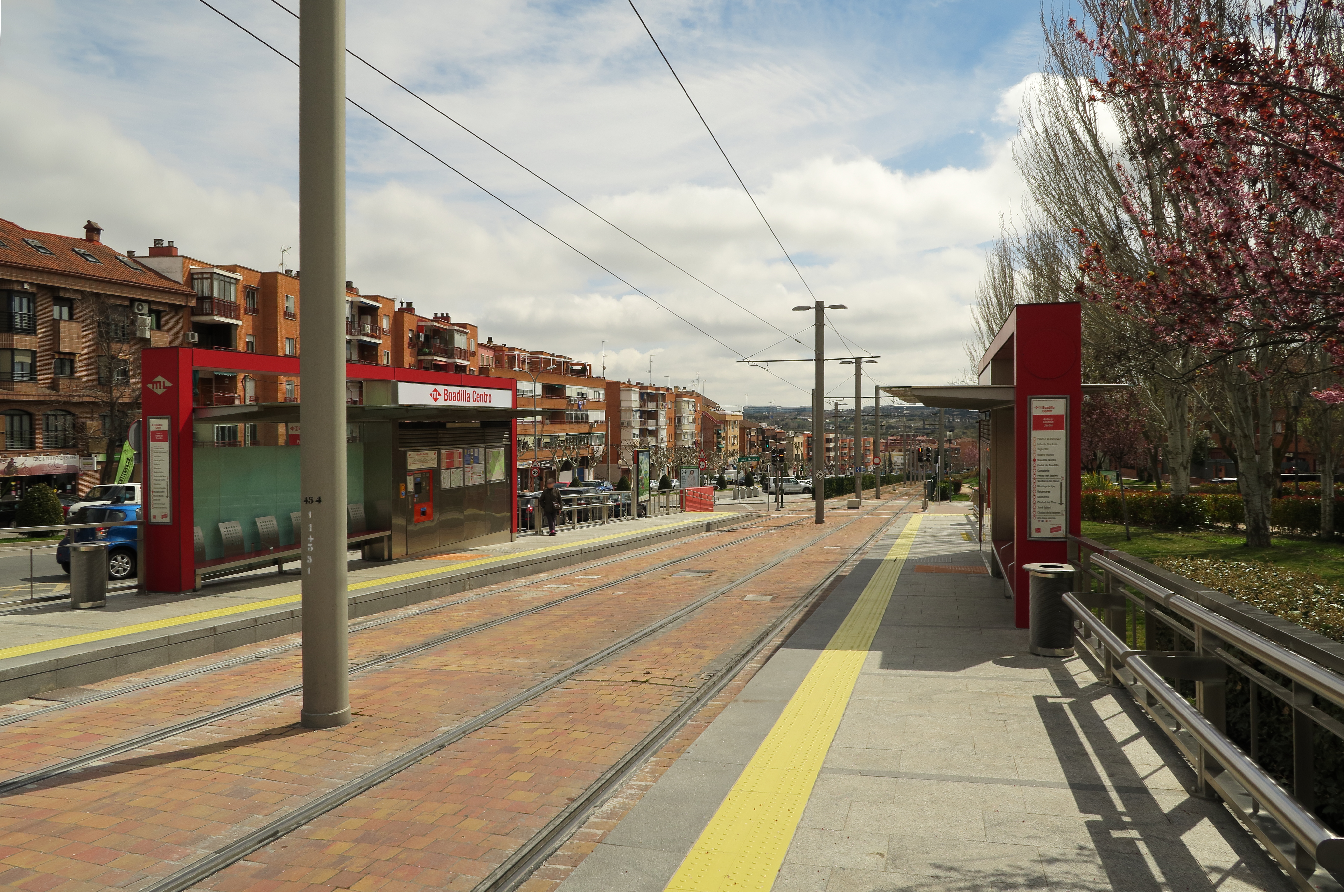 Estación de Boadilla Centro